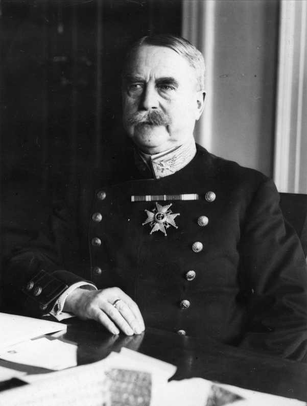 Generalmajor og statsråd Ivar Aavatsmark.